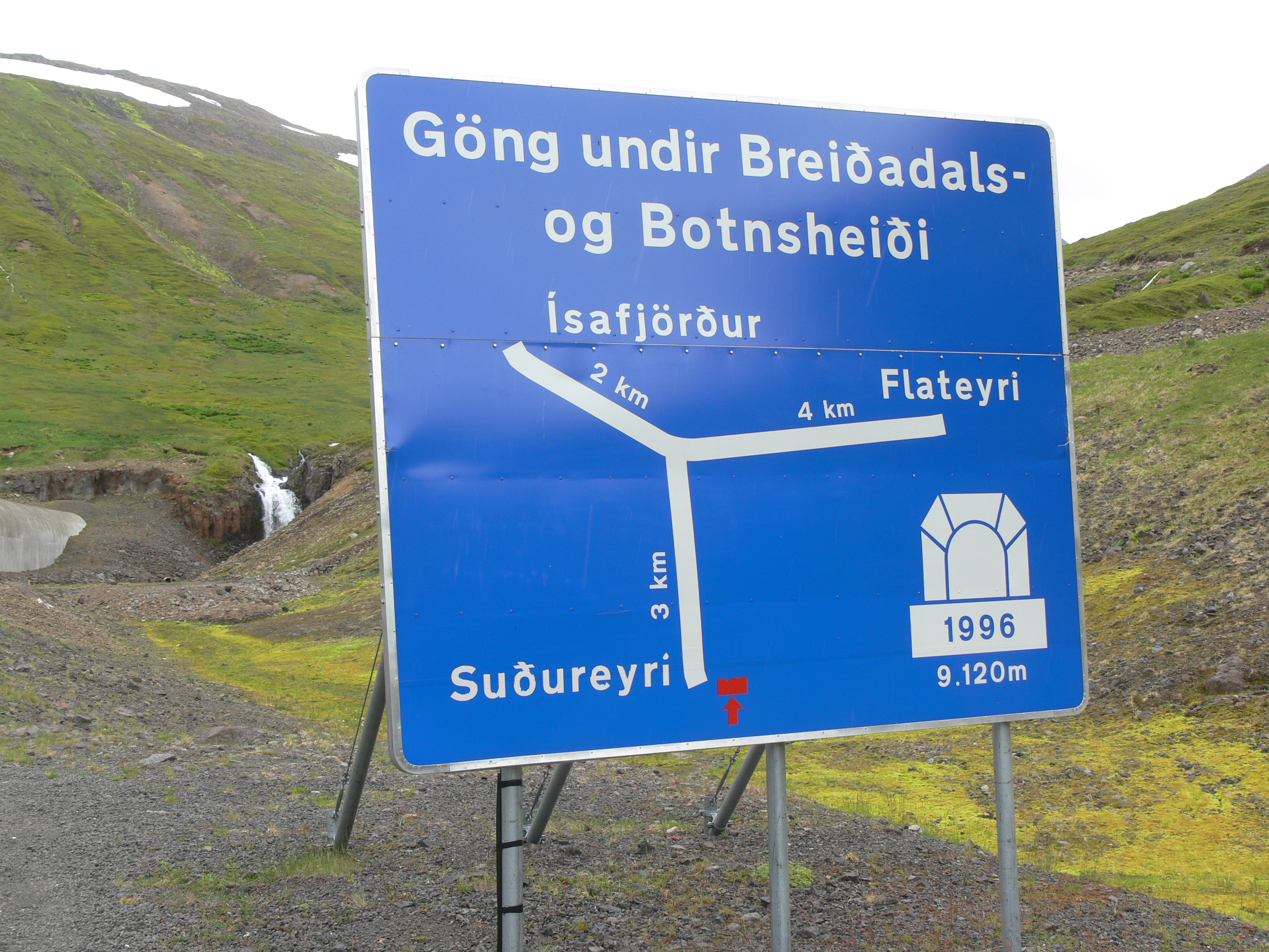 Botnsdalur am Ende des Súgandafjörður. Einfahrt zum Tunnel unter Breiðadals- und Botnsheiði.